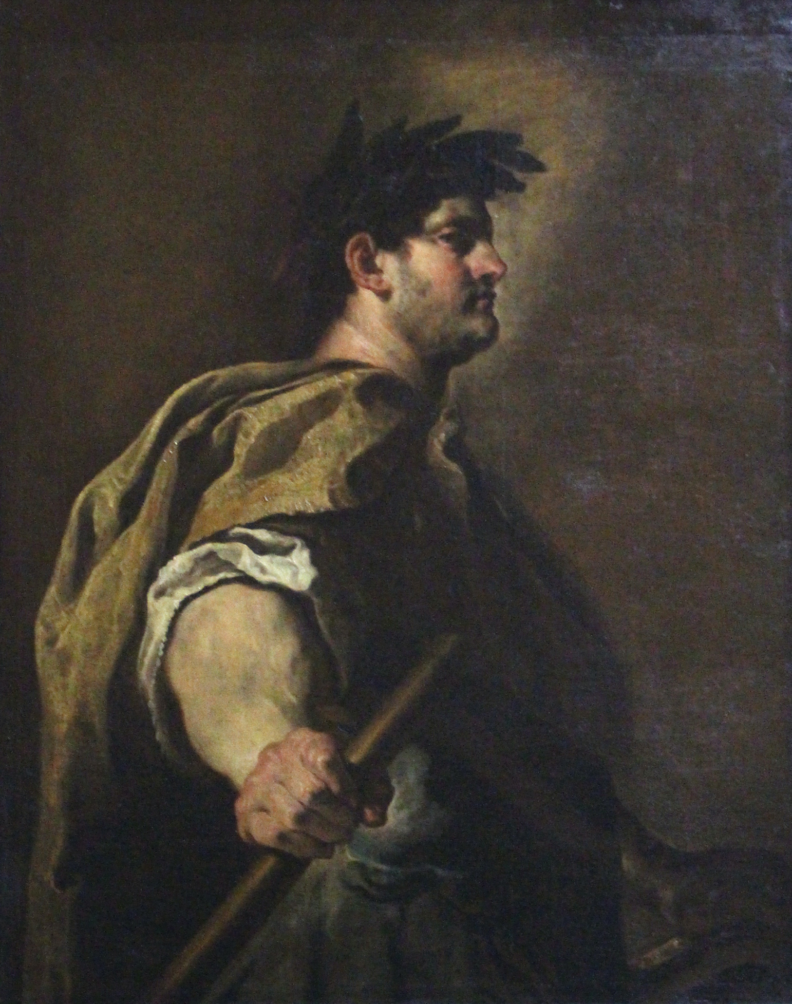 Empereur Domitien-Domenico Fetti-Musee du Louvre